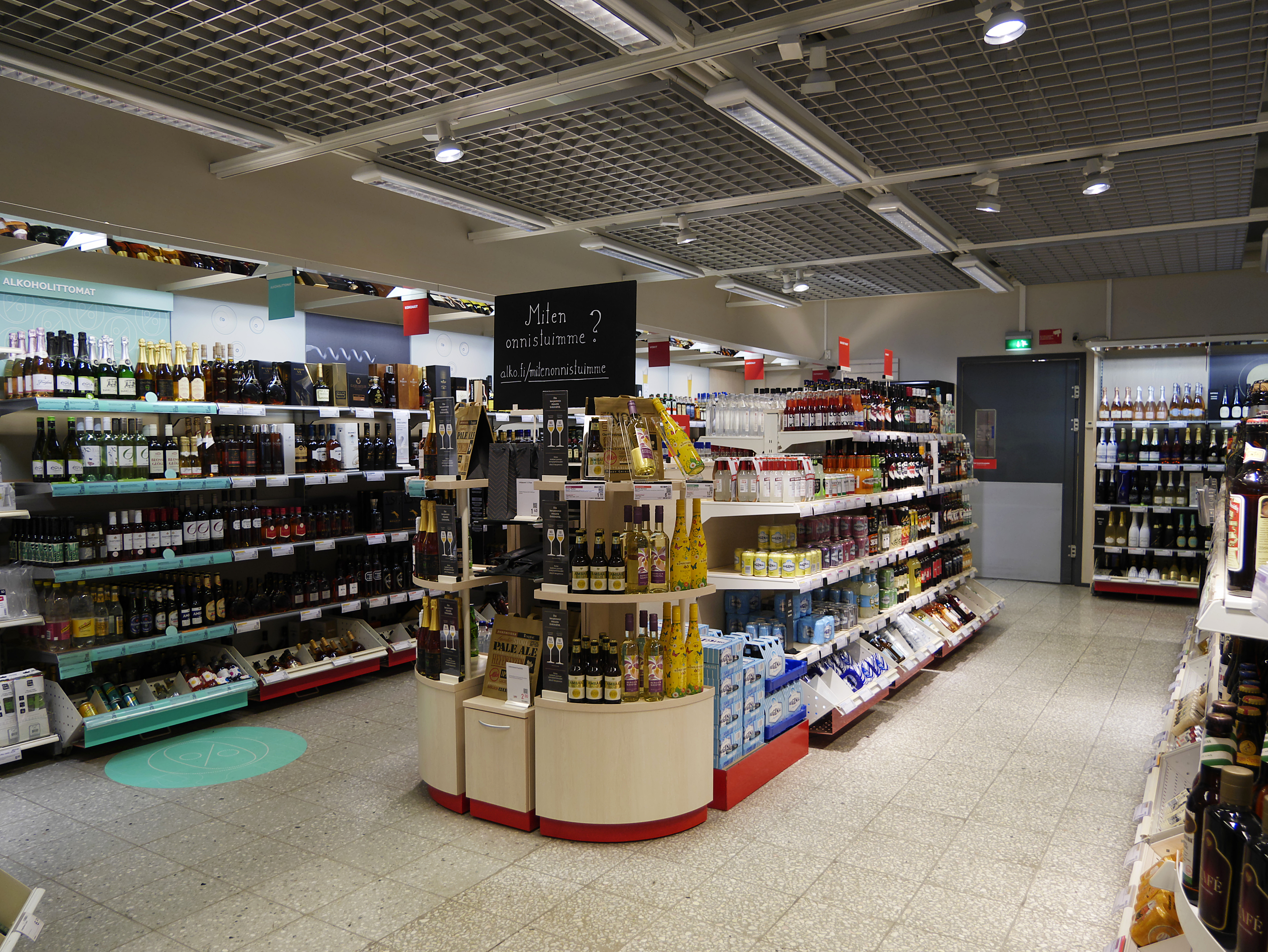 Alkon myymälä sisältä.